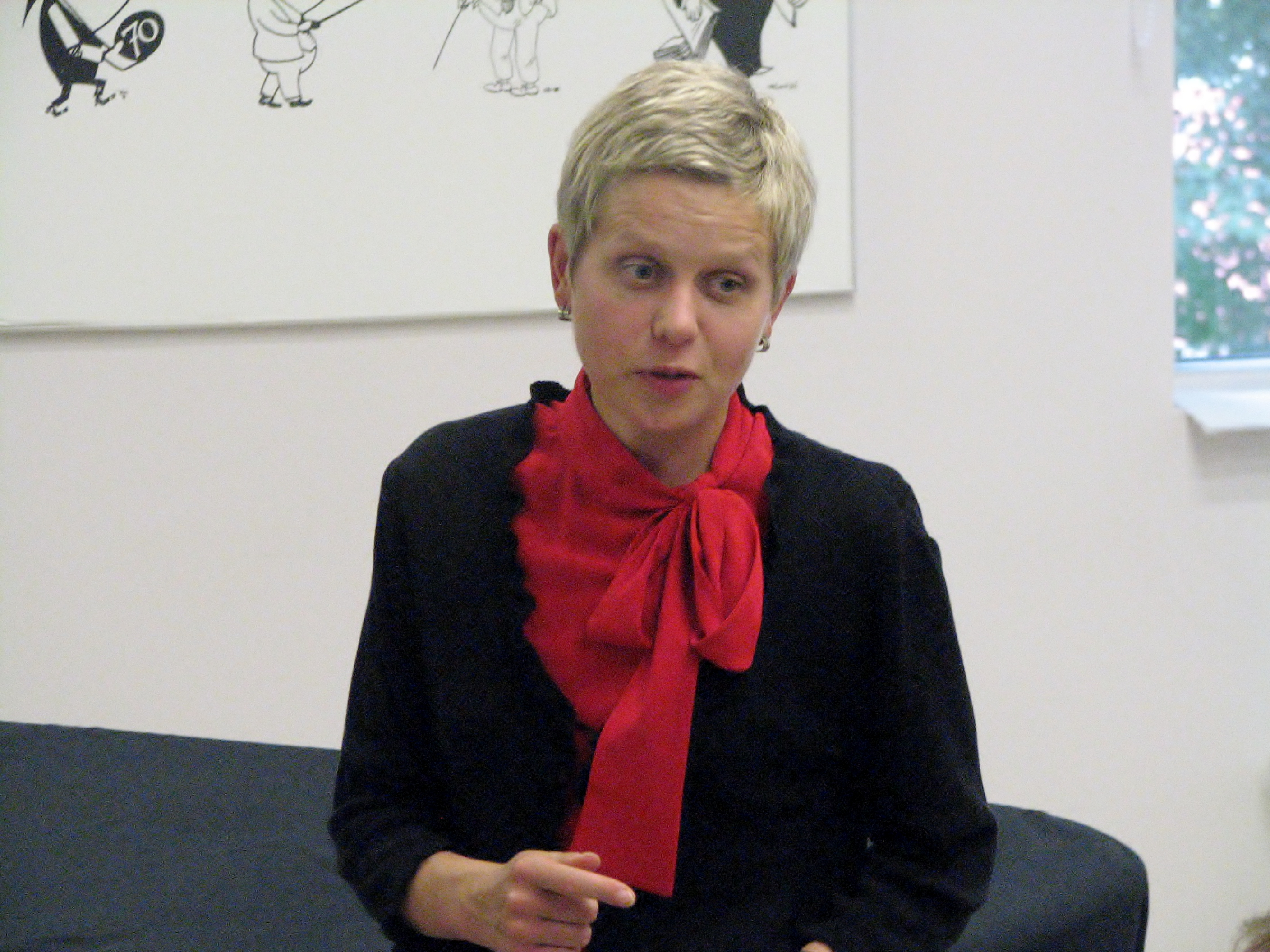 Heli Allik Mihhail Lotmanile pühendatud sümpoosionil